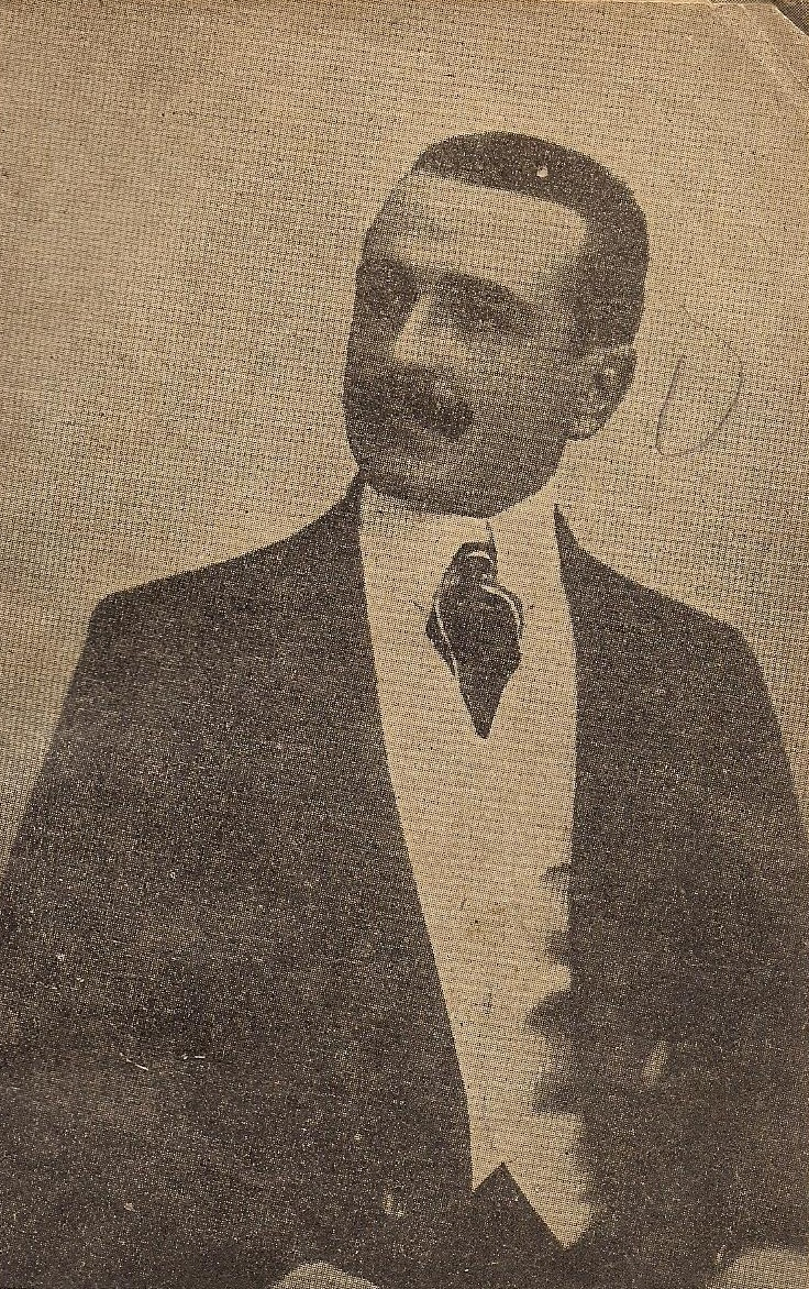 Getúlio Vargas aos 27 anos de idade.